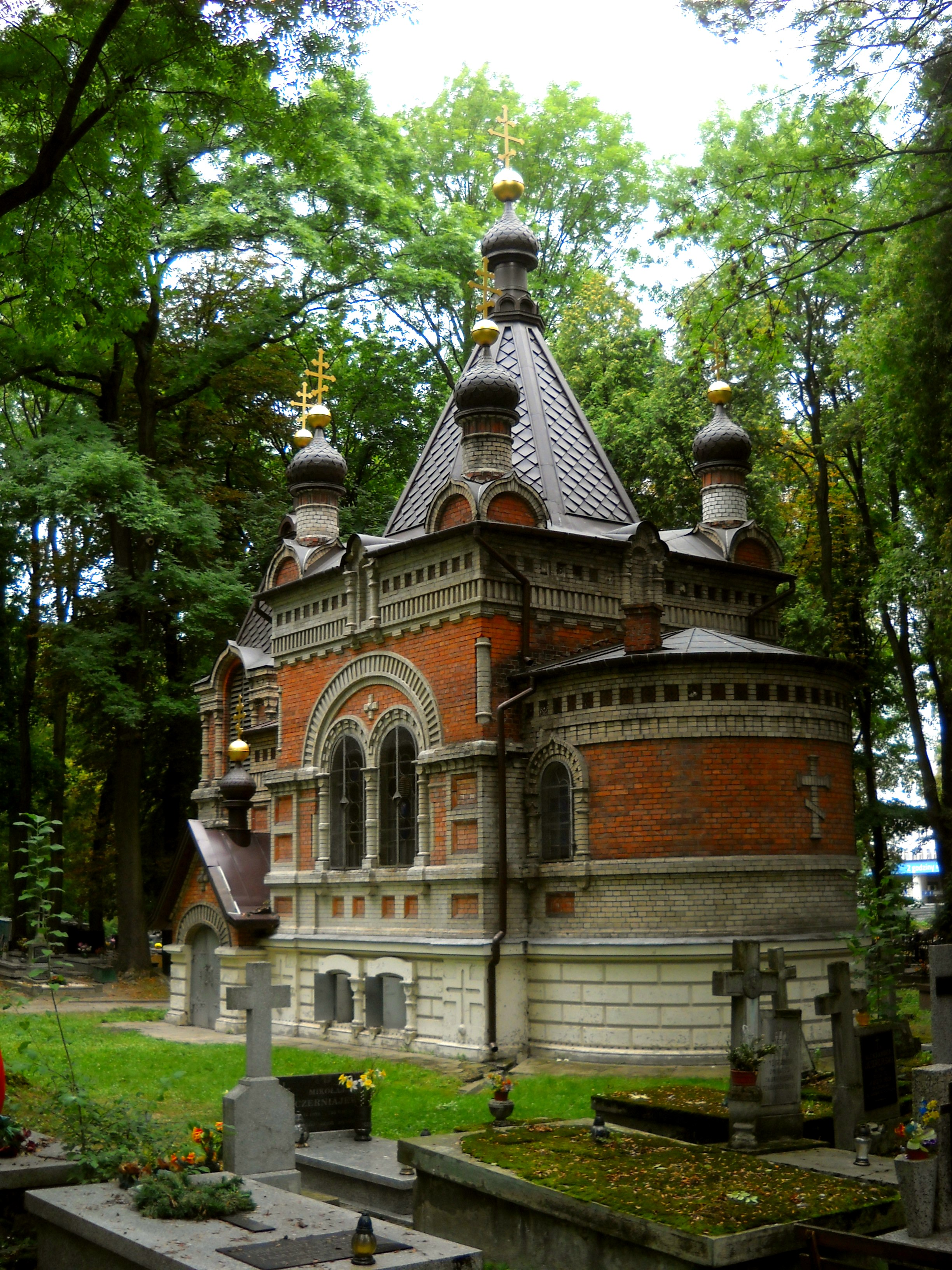 Cerkiew Świętych Niewiast Niosących Wonności w Lublinie, cmentarz prawosławny